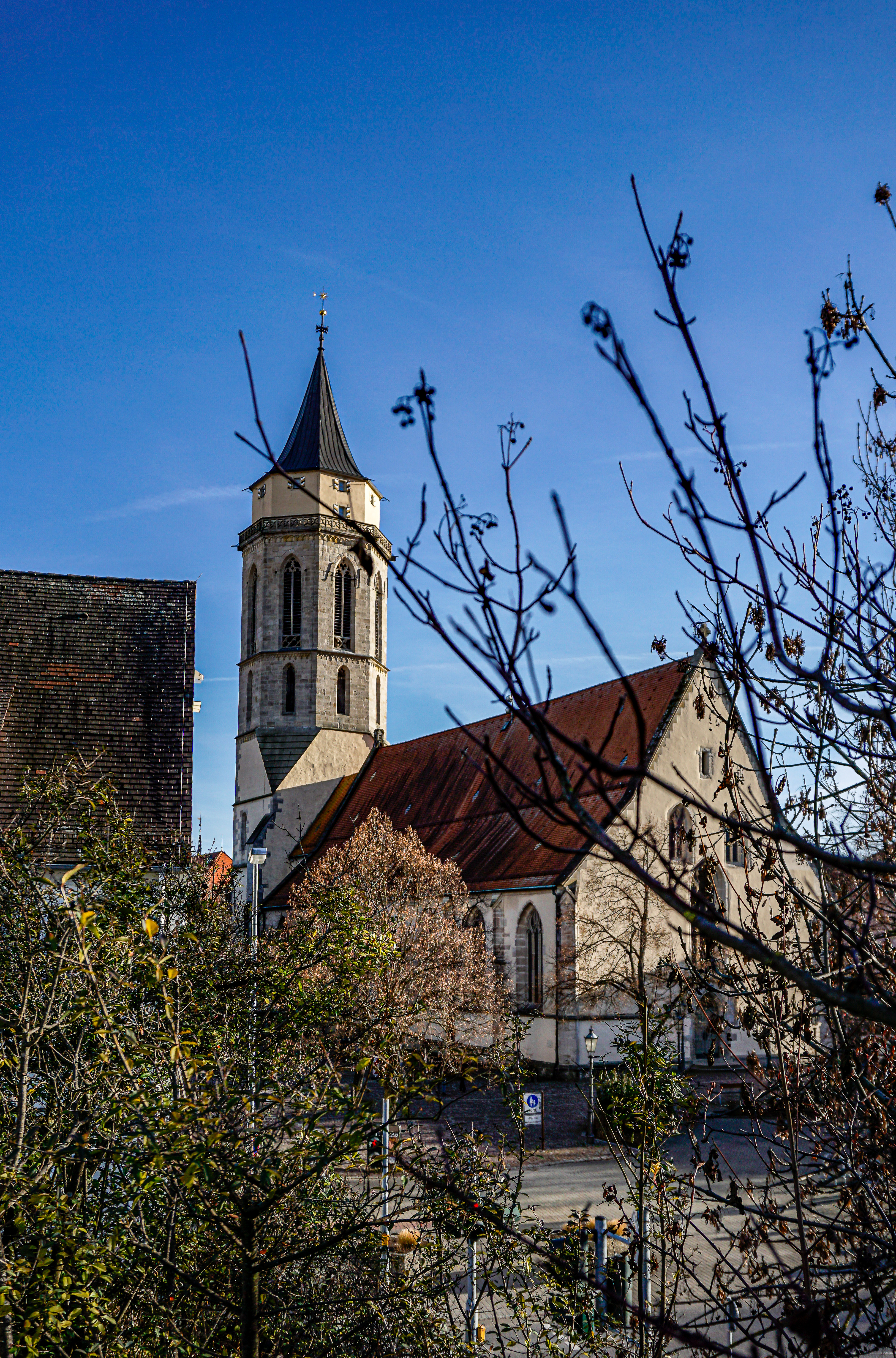 Balingen - Am Spitaltörle - Stadtkirche Balingen